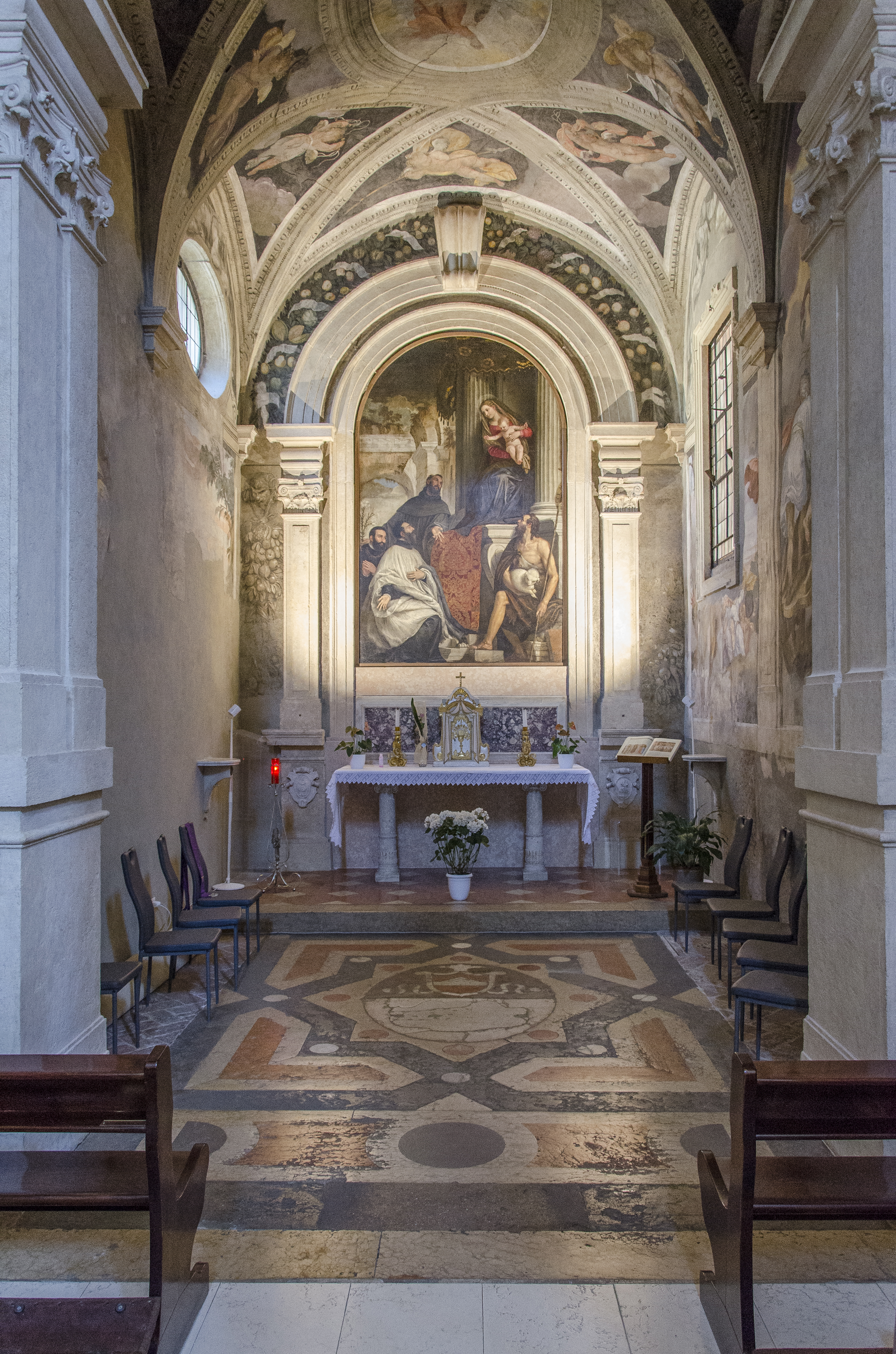 Chiesa di San Paolo a Verona, pala di Paolo Caliari detto "il Veronese" nella cappella Marogna